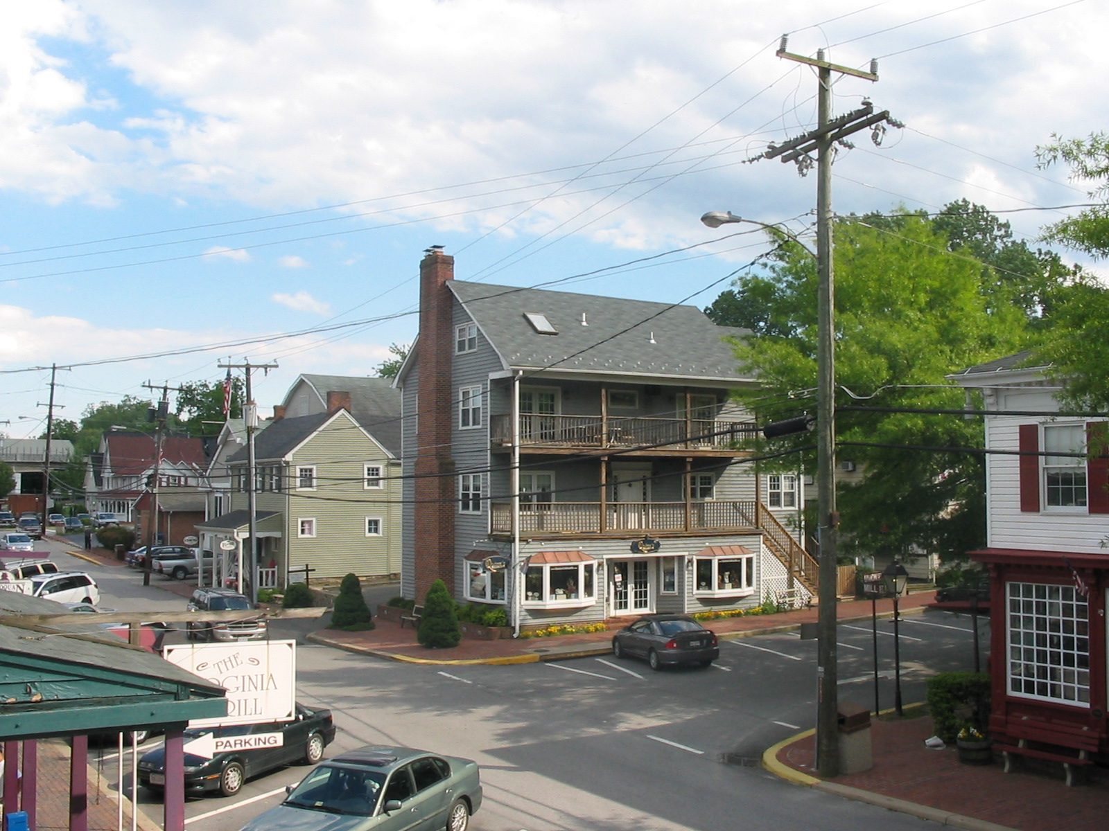 Occoquan, VA